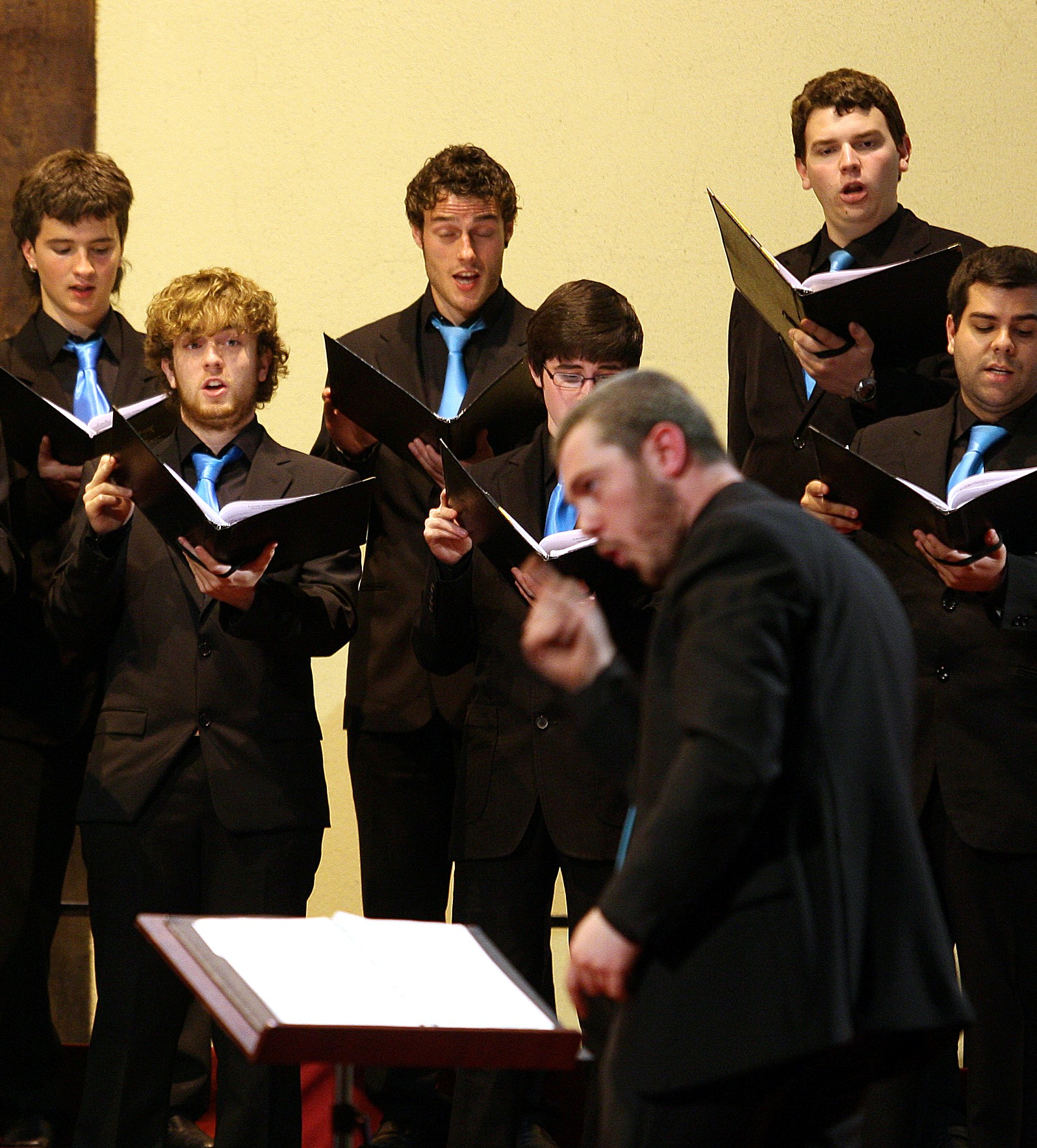 Jon Aizpuruk Ametsa Gazte Abesbatza zuzentzen (Musikaste 2010)